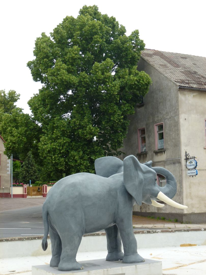 Elefant in Kühren